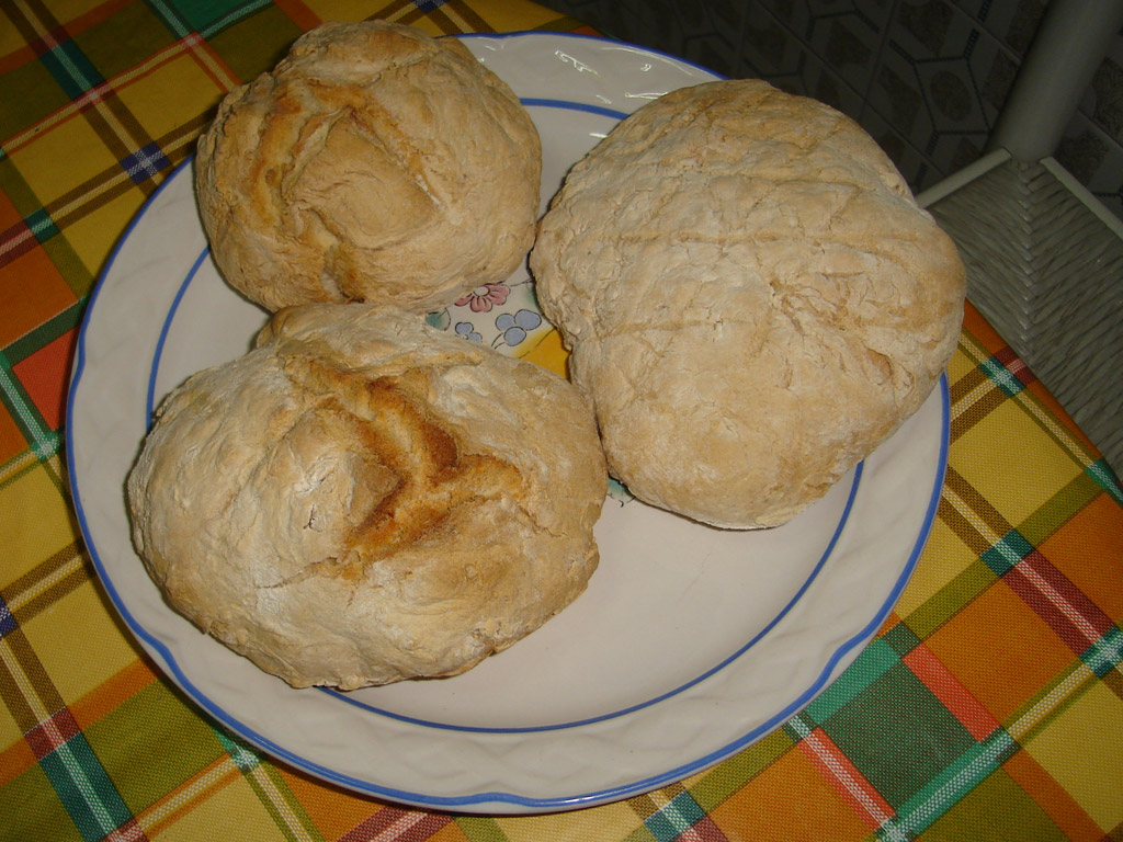 Pan galego de aldea feito na cidade